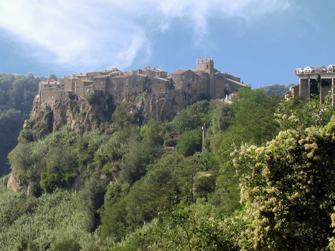 Calcata VT